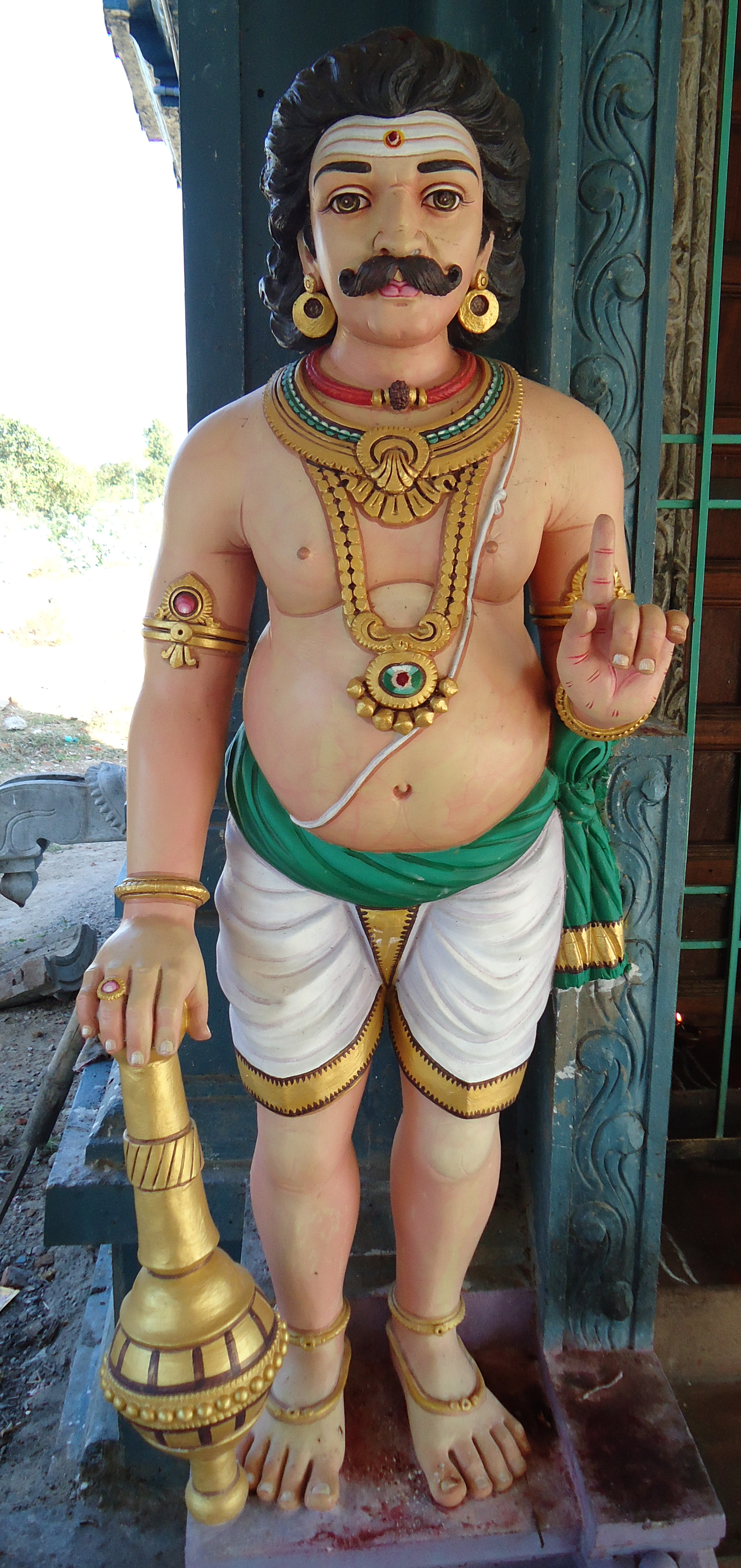 துவாரபாலகர்